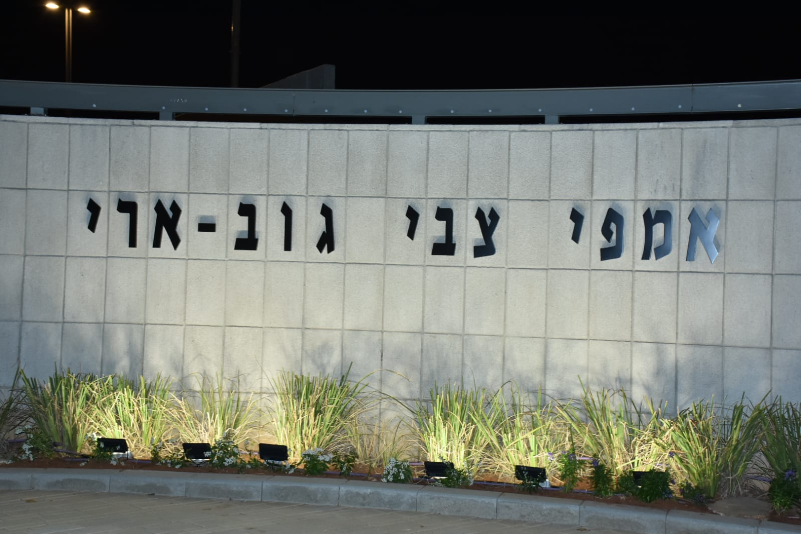 בשנת 2019 נערך טקס קריאת האמפי ביבנה ע"ש ראש העיר, צבי גוב-ארי